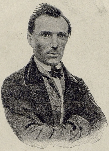 Иван Саввич Никитин (1824-1861) — русский поэт.